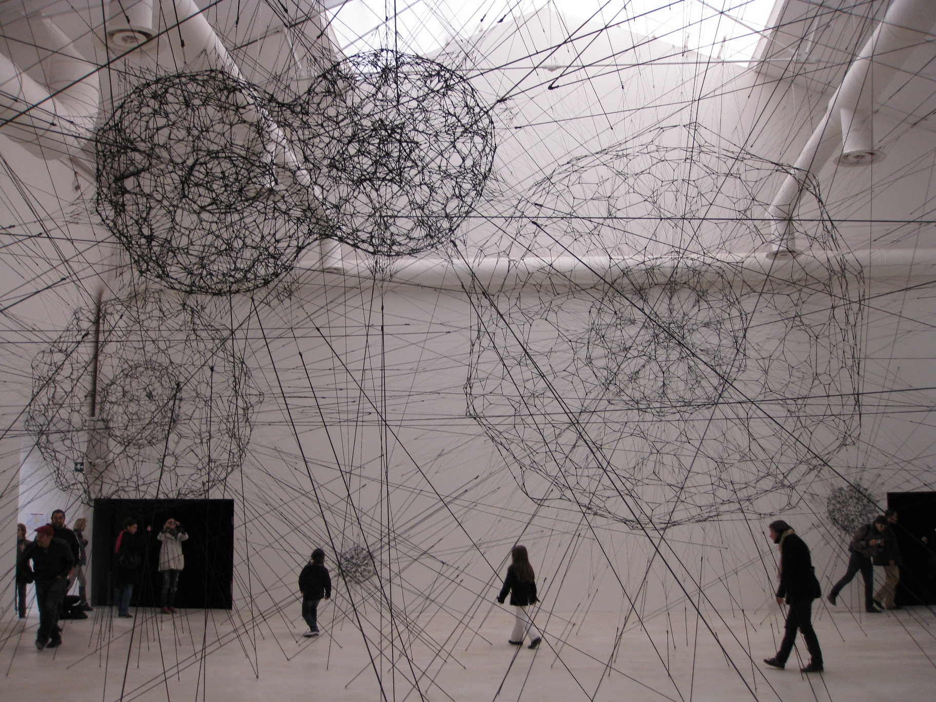 Venezia - Biennale d'arte 2009